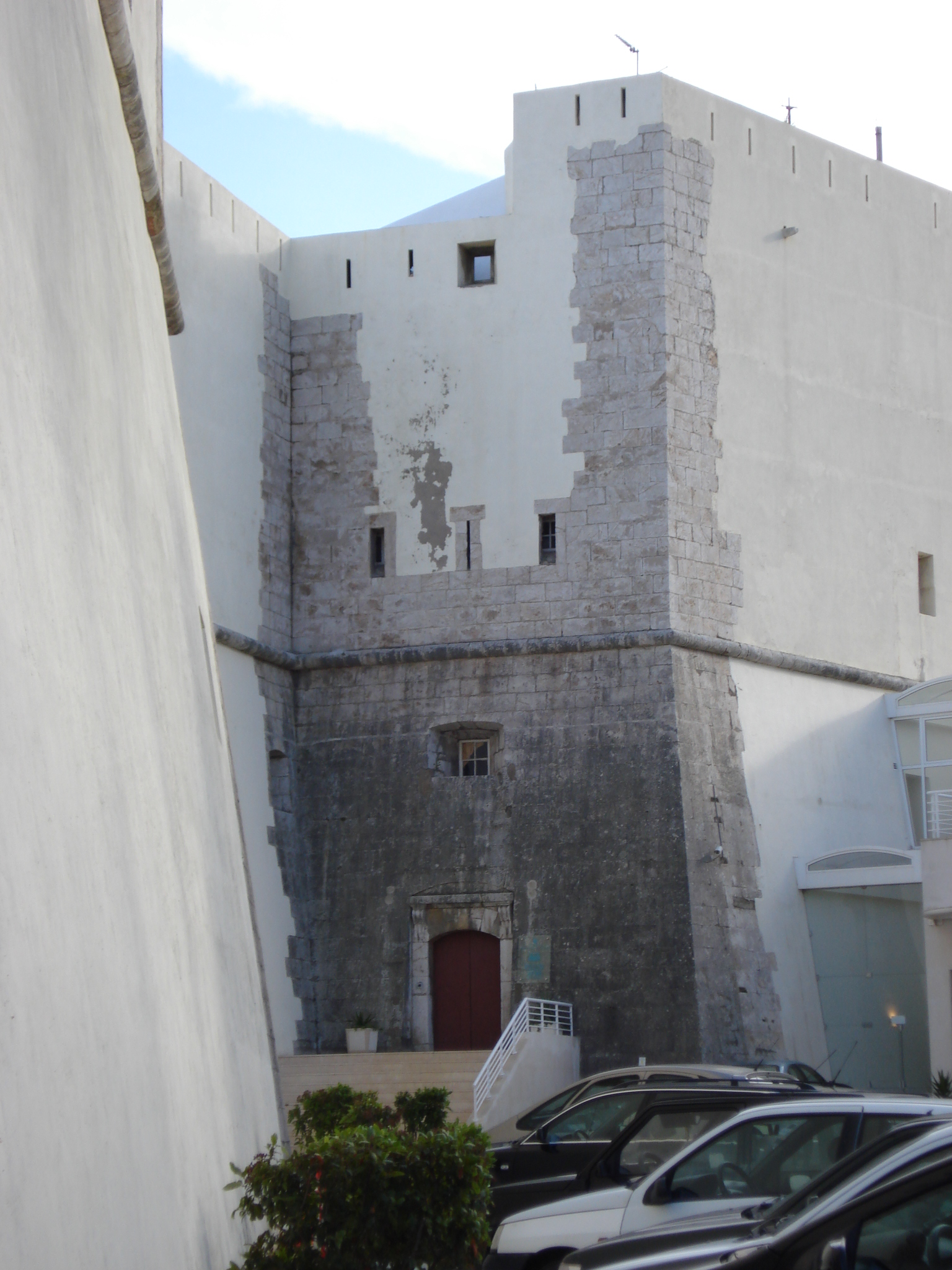 Entrada principal do forte